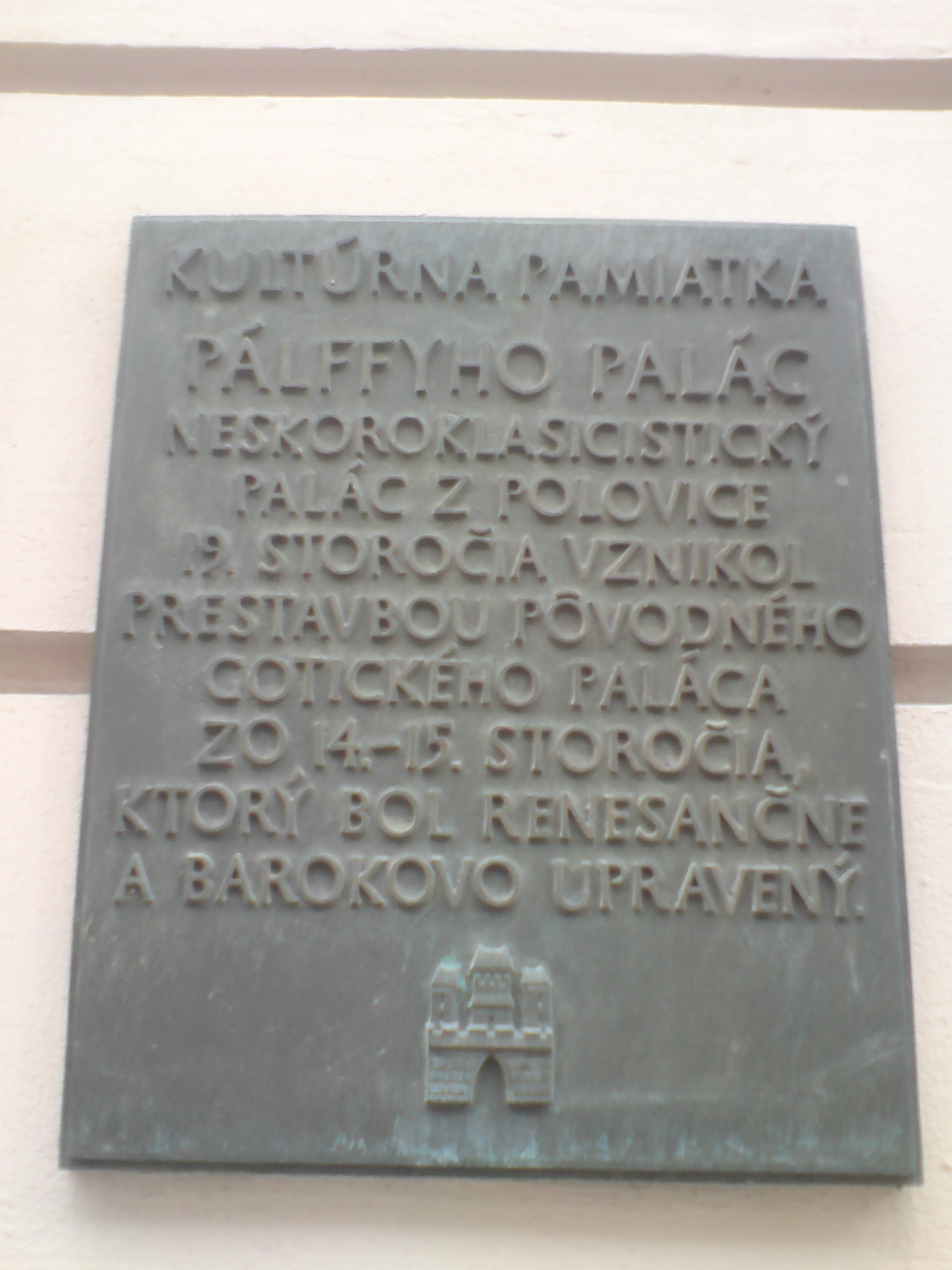 Pálffyho palác, Panská, Bratislava